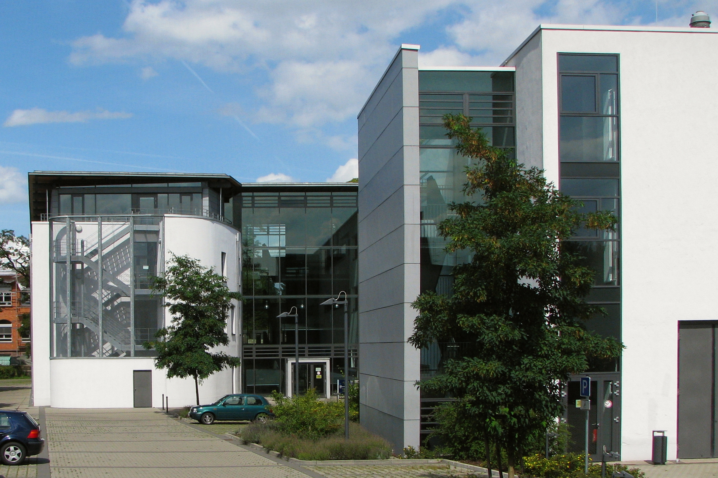 Erweiterungsbau der HAWK Hochschule, Fakultät für Management, Soziale Arbeit und Bauen in Holzminden Niedersachsen - Foto Wolfgang Pehlemann IMG_0982